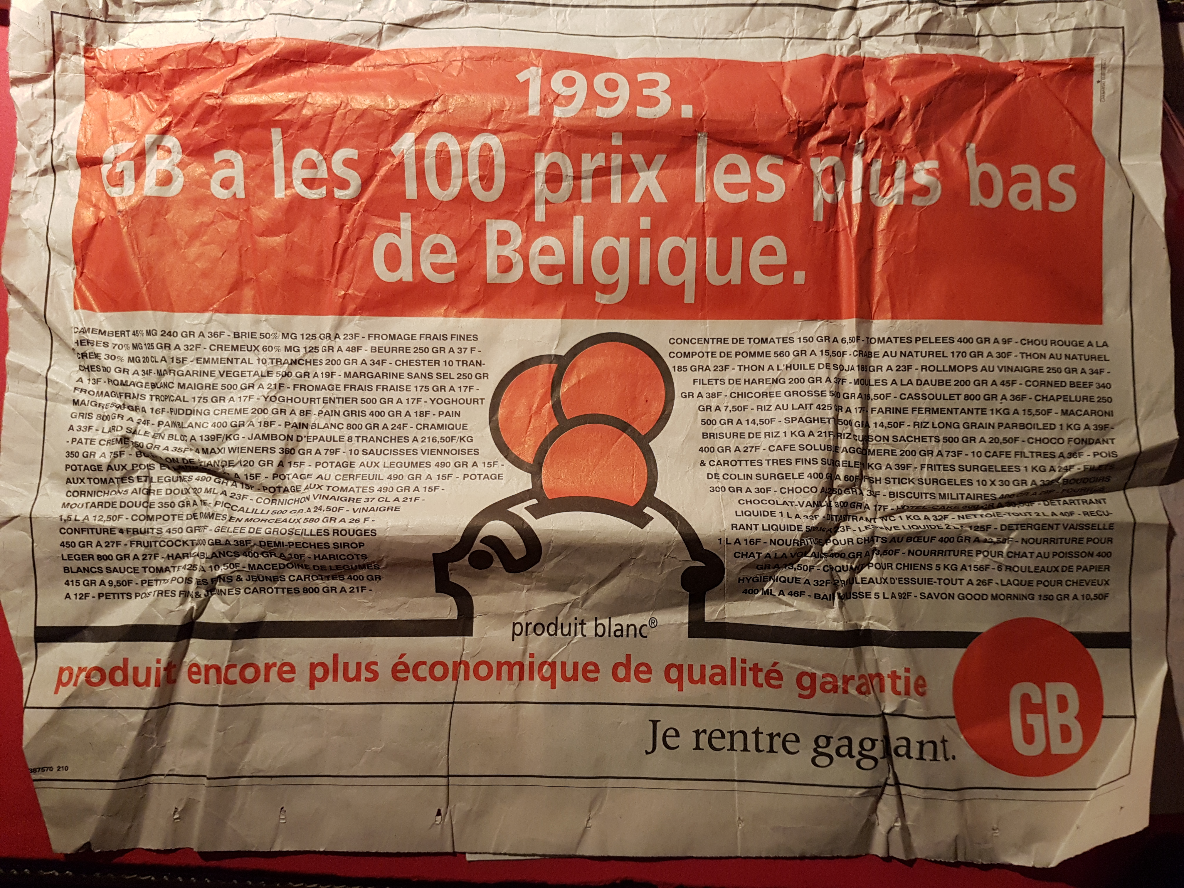 Publicité des magasins GB en 1993